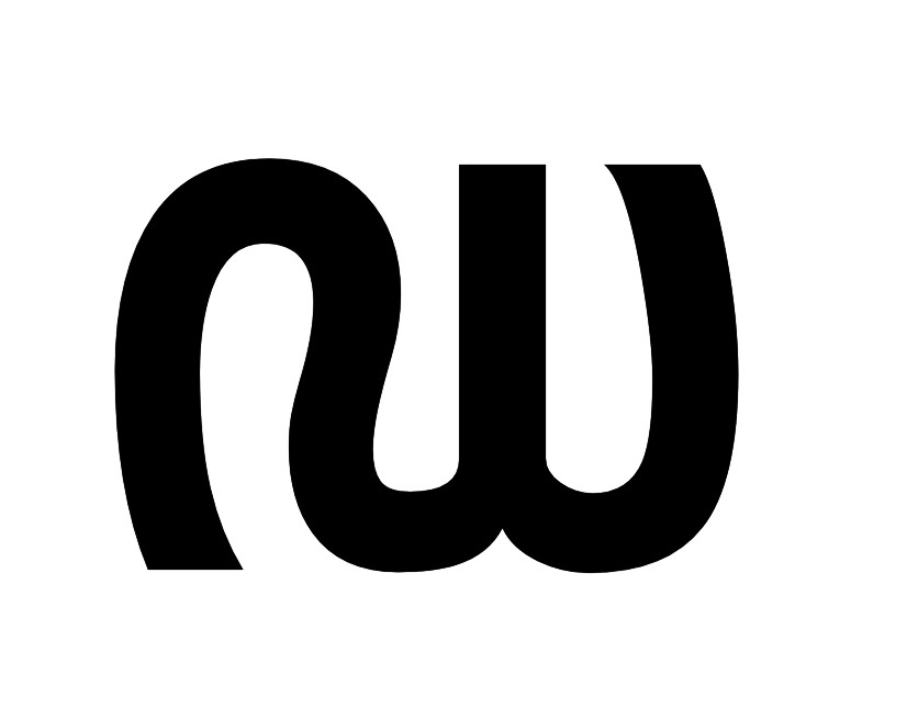 ഡ മലയാളം അക്ഷരം